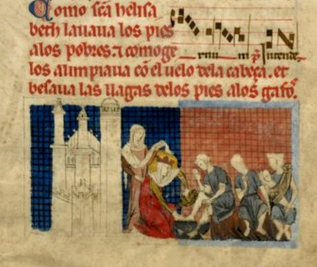 Elisabeth de Thuringe lavant les pieds des pauvres :Officium et vita s. elisabeth thuringiae